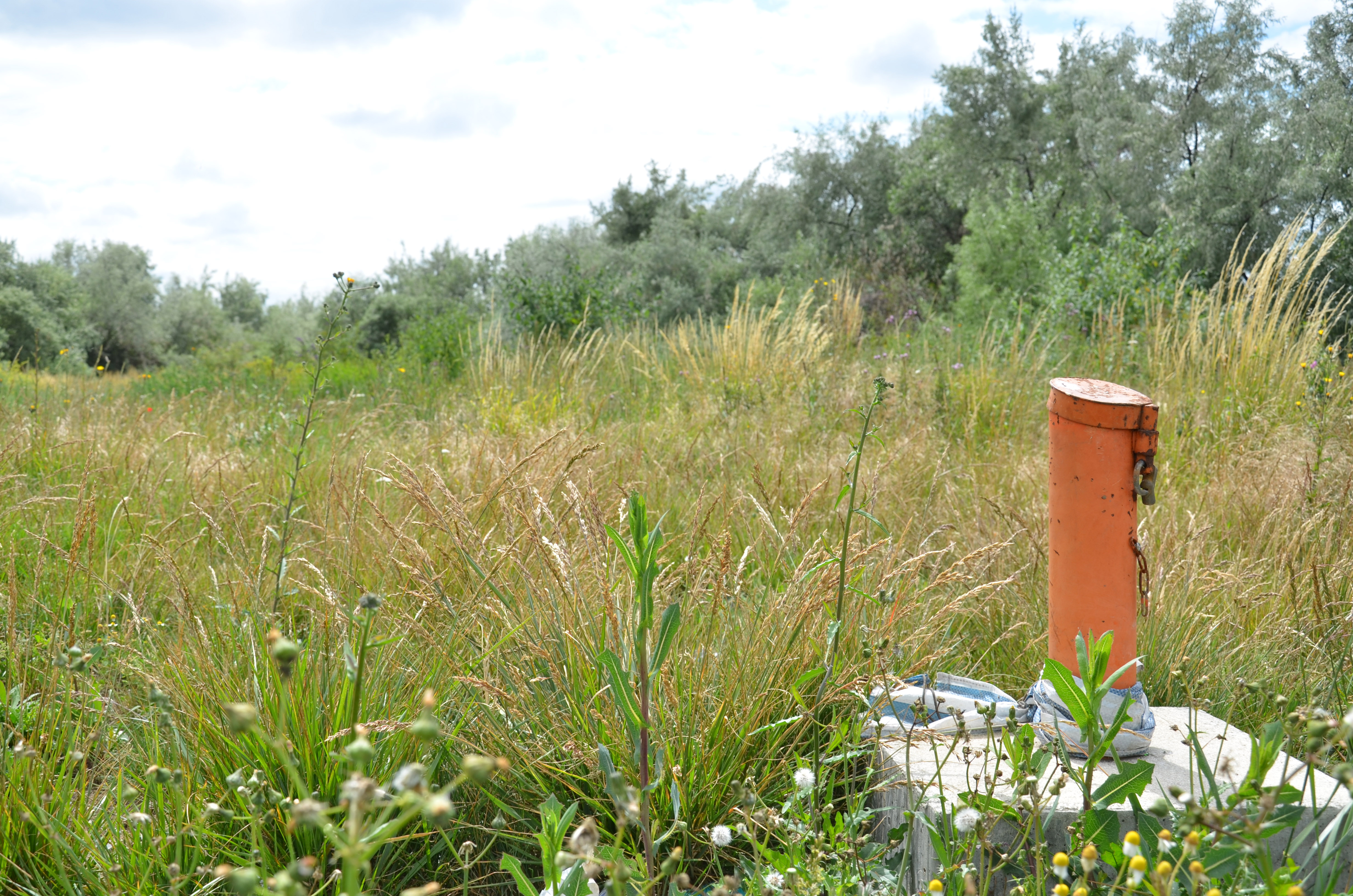 Piezzomètre, destiné à surveiller le niveau de la nappe, et éventuellement sa qualité, dans la zone de l'Union, non loin du Canal de Roubaix